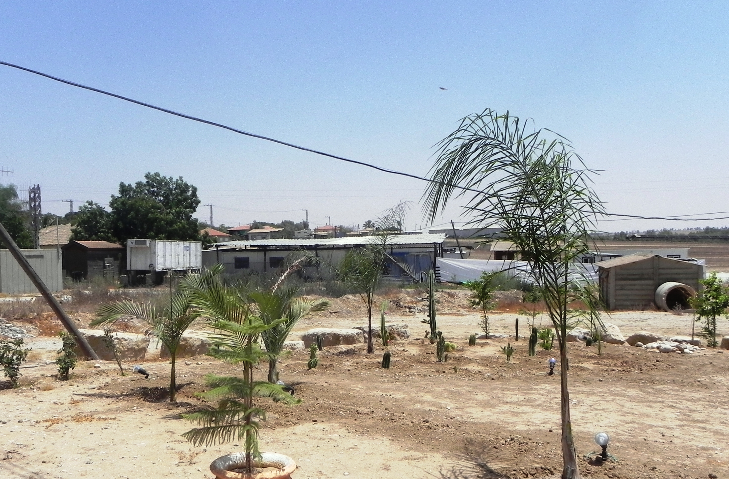 המושב